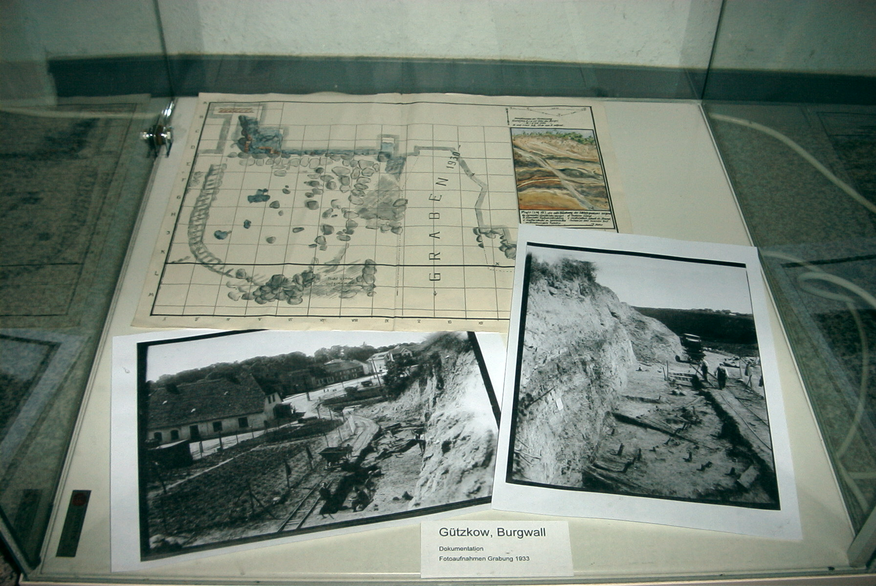 Vitrine mit orig. Dokumenten der Grabung 1933/34 in EMAU